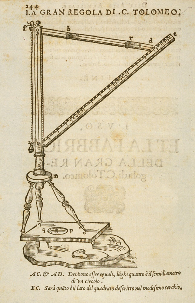 Disegno della Gran Regola di Tolomeo.